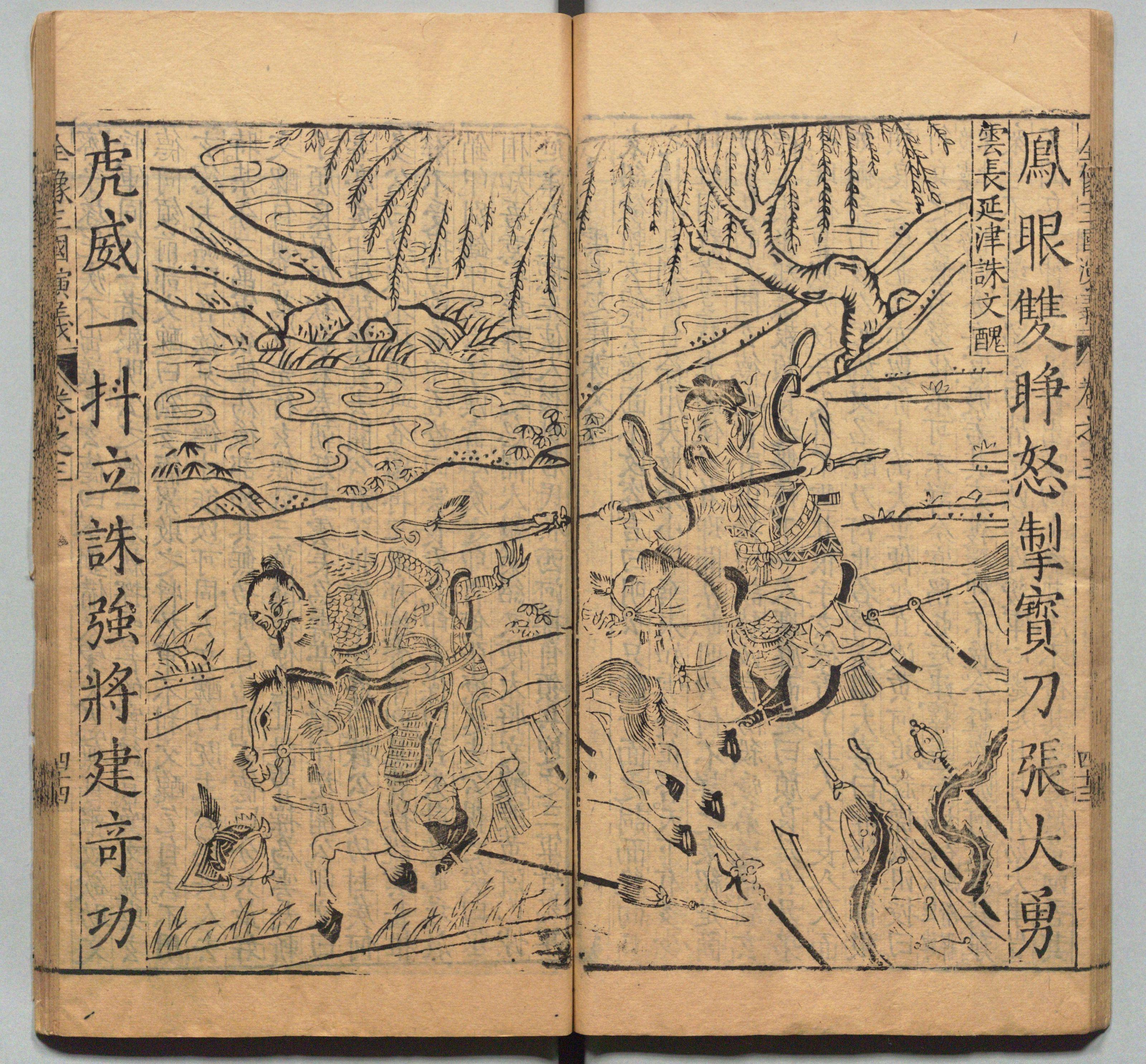 新刊校正古本大字音释三国志通俗演义 明万历十九年书林周曰校刊本